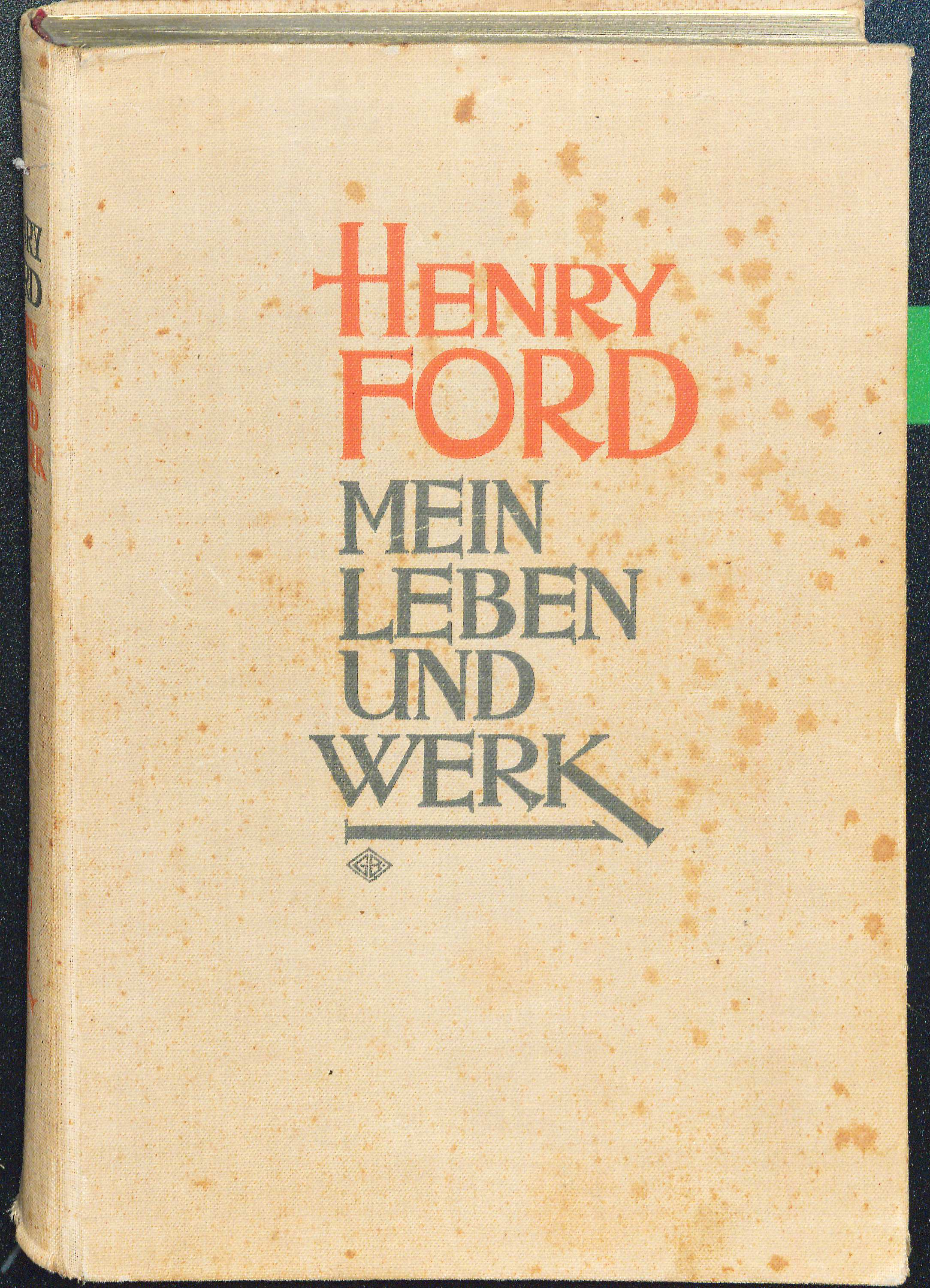 Henry Ford zusammen mit Samuel Crowther: Mein Leben und Werk. Übersetzung aus dem Englischen Curt Thesing zusammen mit Marguerite Thesing. Leipzig: Paul List Verlag 1923